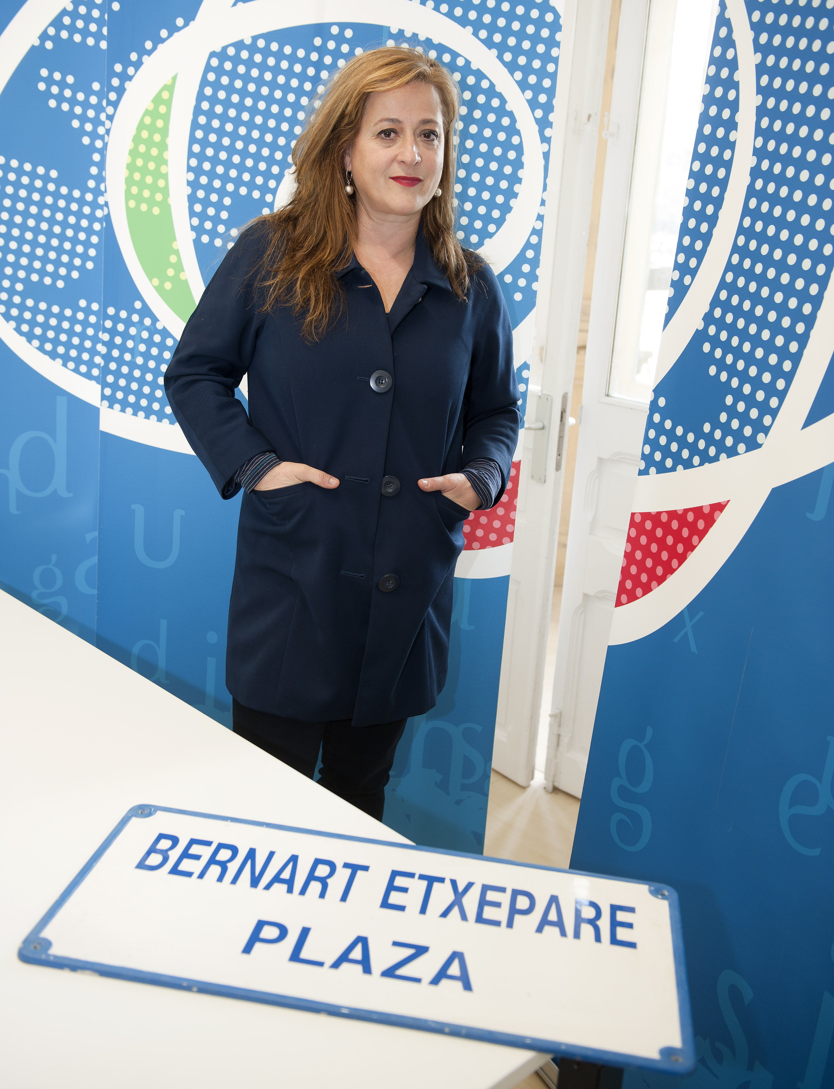 Kultura kanpoan zabaltzeko diru-laguntza deialdi berrituak argitaratu ditu Etxepare Euskal Institutuak